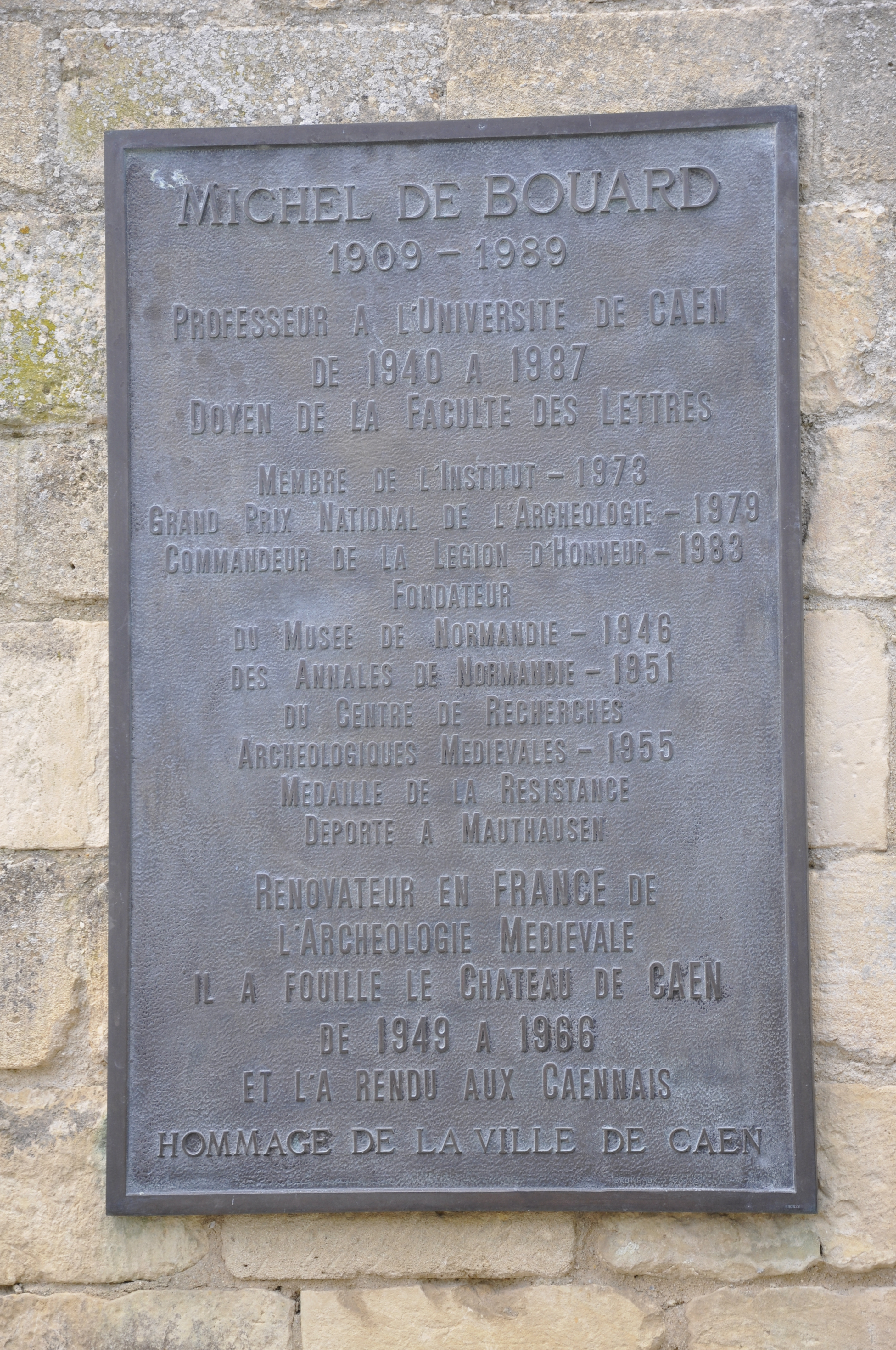 plaque en l'honneur de Michel de Bouärd au château de Caen